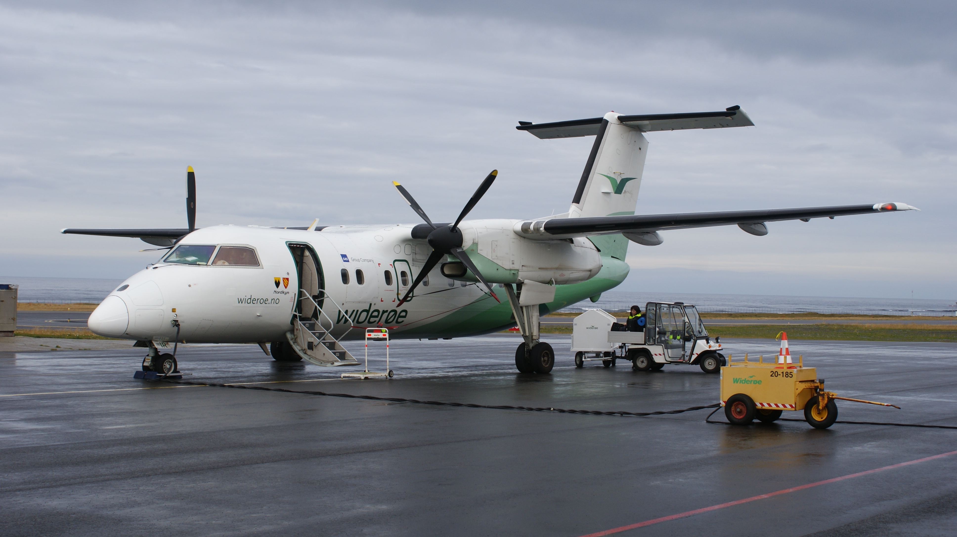 Berlevåg Airport, Varangerhalvøya, Finnmark, Norway. Widerøe Dash-8 100.